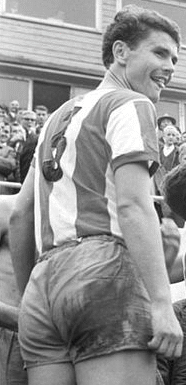 Factual corrections and alternative descriptions are encouraged separately from the original description. Additionally errors can be reported at this page to inform the Bundesarchiv. Original historic description: FDGB-Pokal, Finale, 1 FC Union Berlin - FC Carl Zeiss Jena 2:1 Halle: 17. FDGB-Pokalfinale im Fußball 1. FC Union Berlin gegen FC Carl Zeiss Jena 2:1 am 9.6.1968 Union-Kapitän Ulrich Prüfke (Mitte) und Ralph Quest halten die schwere Bronzestatue ihren Anhängern entgegen. Links: Verteidiger Wolfgang Wruck. [Halle.- Spieler des 1. FC Union Berlin mit dem FDGB-Pokal, jubelnd] Abgebildete Personen: * Wruck, Wolfgang: Fußballspieler, 1. FC Union Berlin, DDR